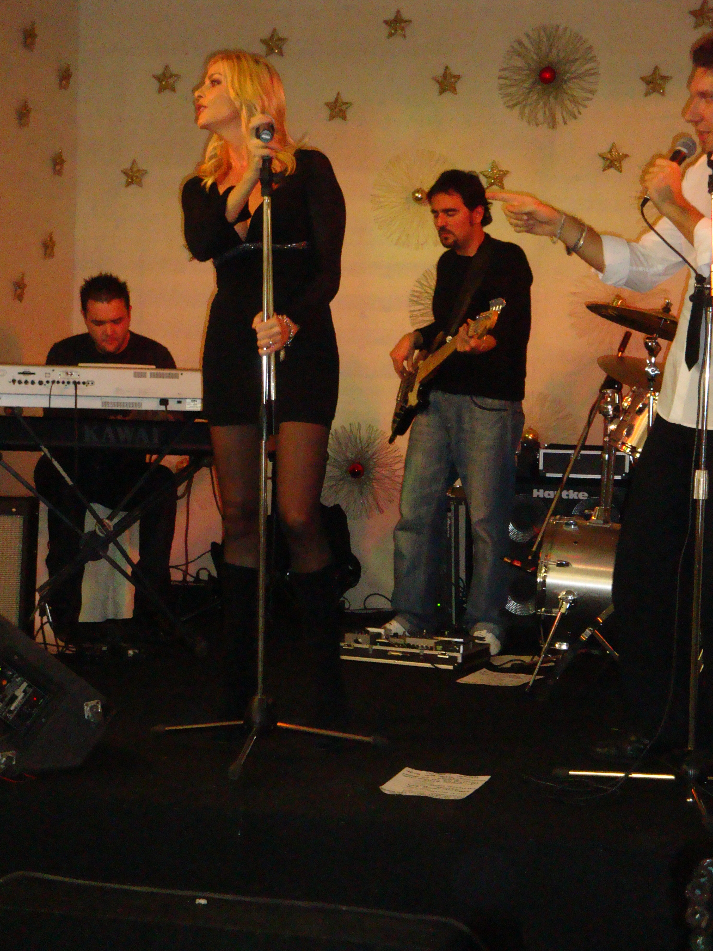 Stefania Orlando ad Alessandria durante la festa FIDAPA (Federazione Italiana Donne Arte Professione Affari)